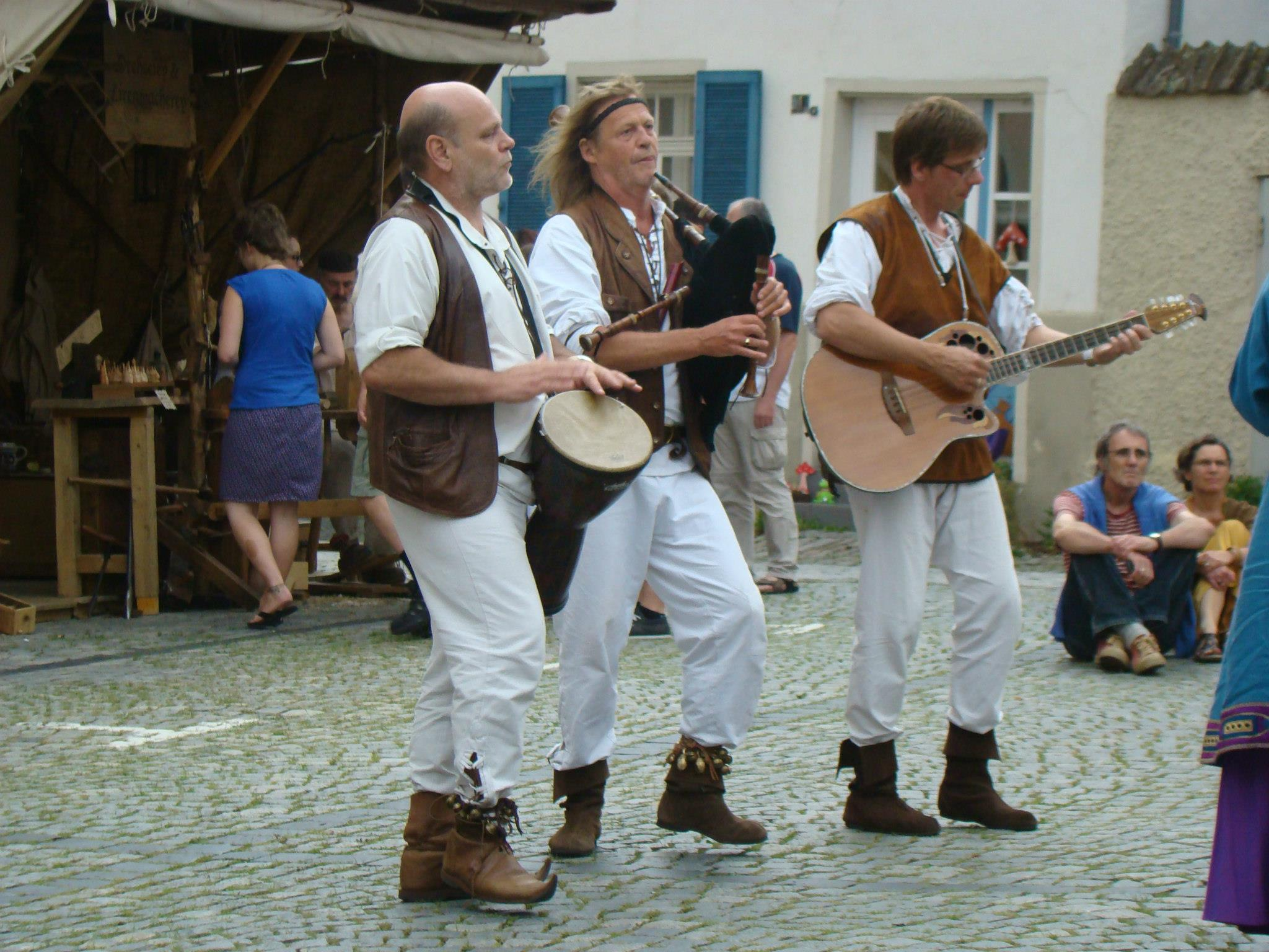 Des Geyers Schwarzer Haufen, live beim Zunftmarkt in Bad Wimpfen 2012